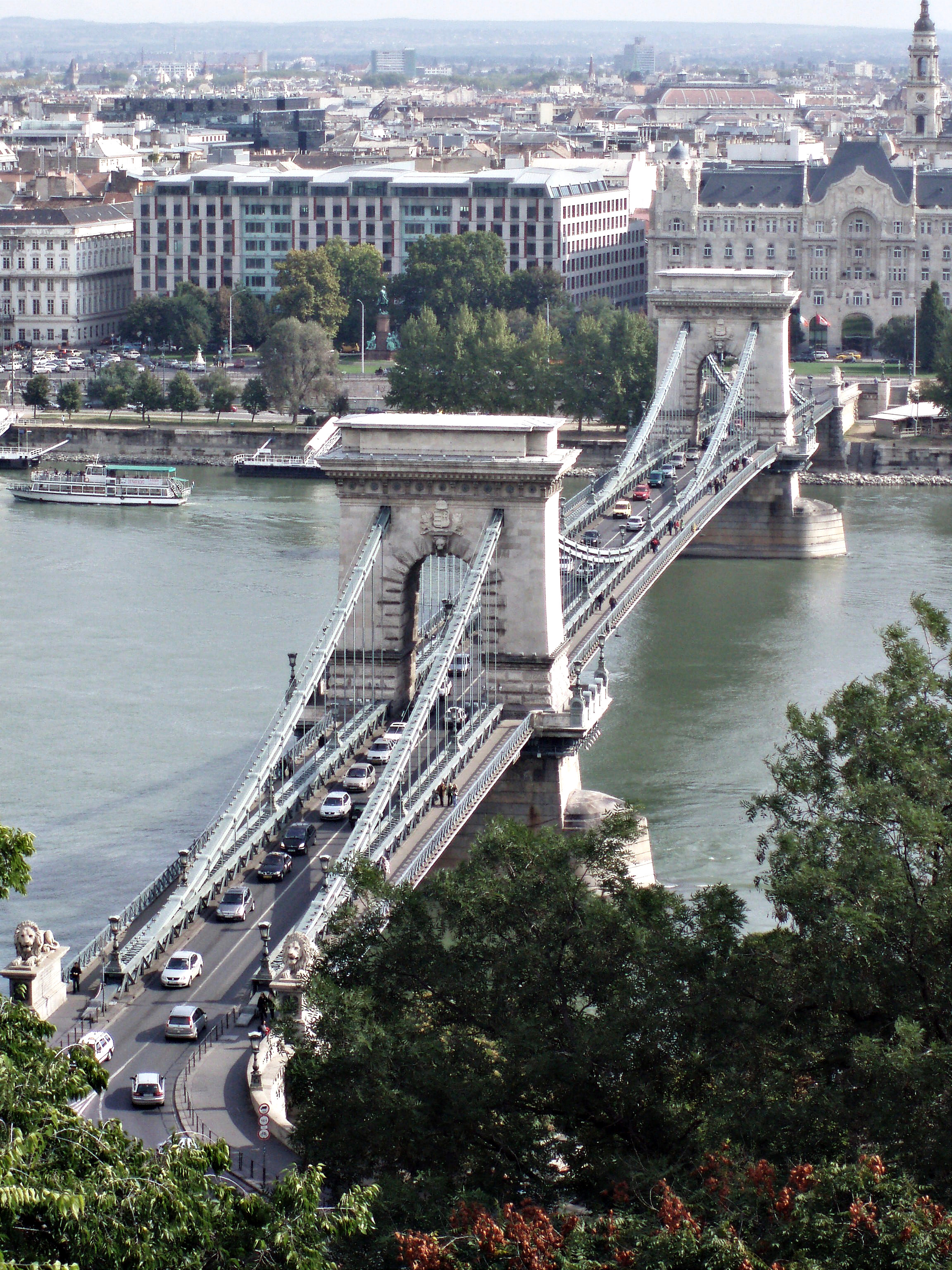 A budapesti Széchenyi lánchíd